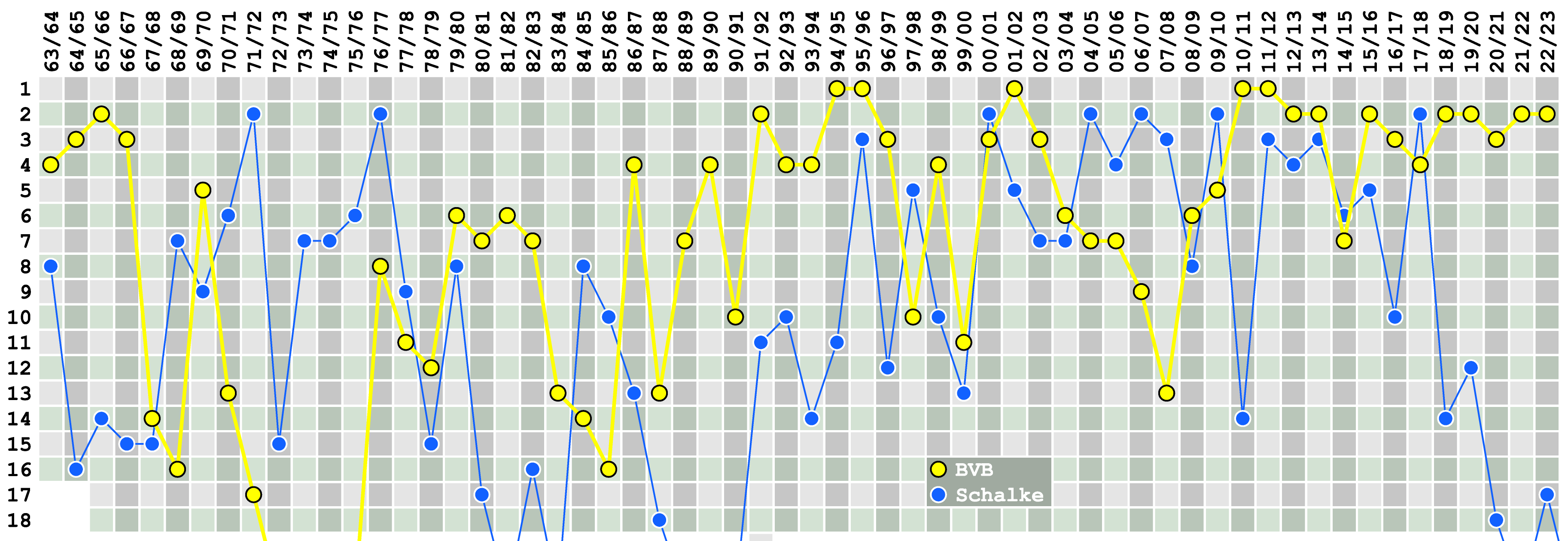 Die Platzierungen des FC Schalke 04 und der Borussia Dortmund in der Bundesliga seit der Saison 1963/64. In 56 Jahren hatte 36-mal die Borussia die Nase vorn, 20-mal Schalke.